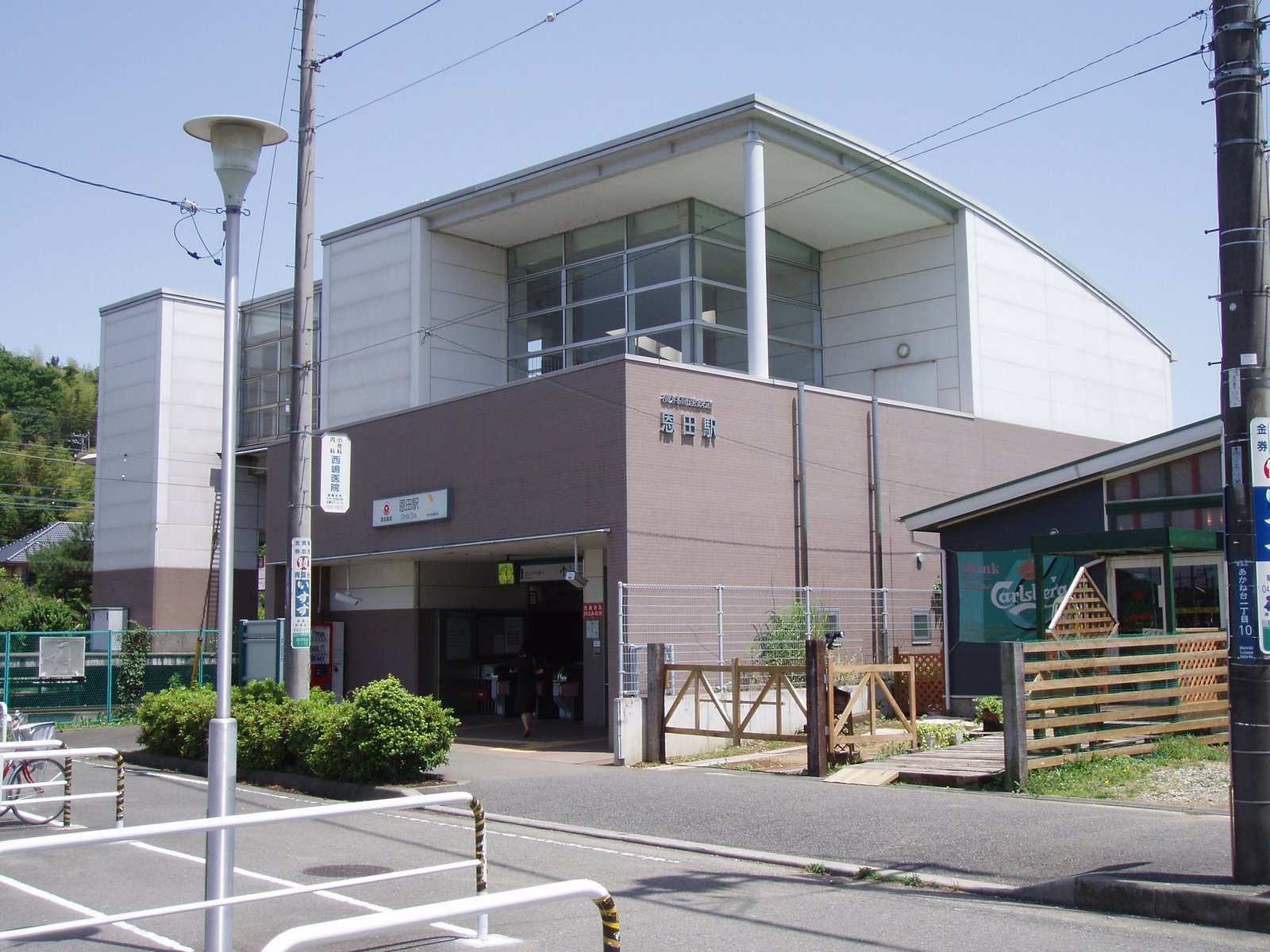 こどもの国線 恩田駅